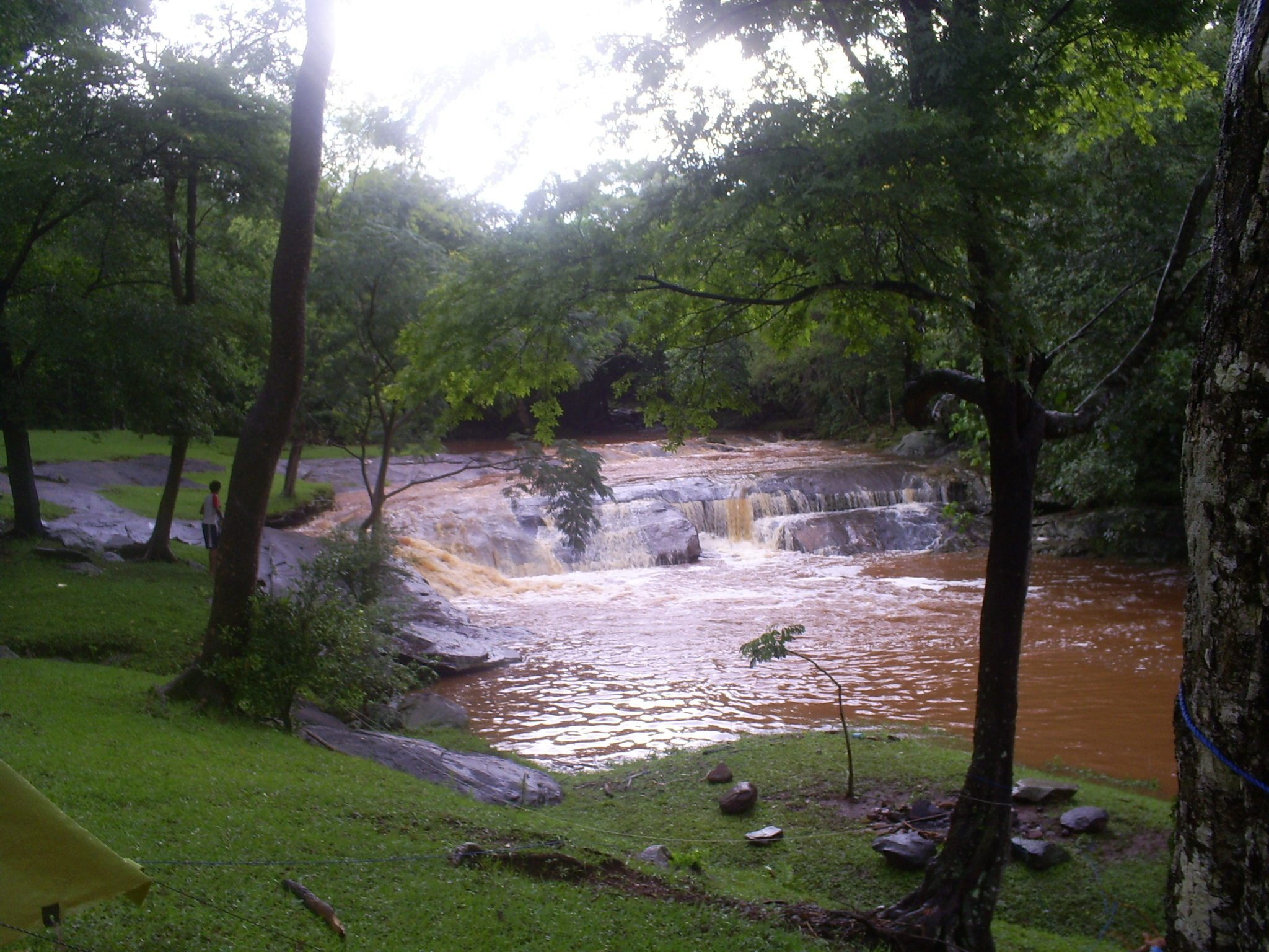 Arroyo en Paraguay